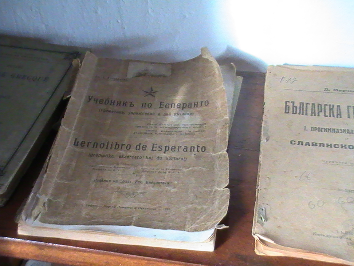 Болгарский учебник эсперанто со словарём в музее образования в Златограде (Смолянская обл. Болгарии)